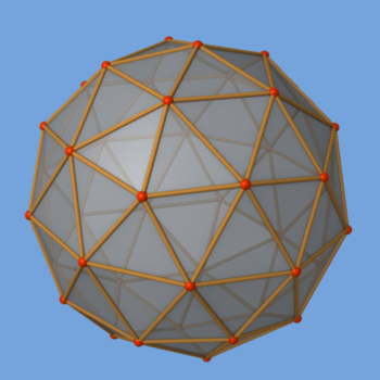 แบบจำลองสามมิติ icosphere ประกอบขึ้นโดยการอ้างอิงตำแหน่งด้วย vertex, edge และ face (polygon)